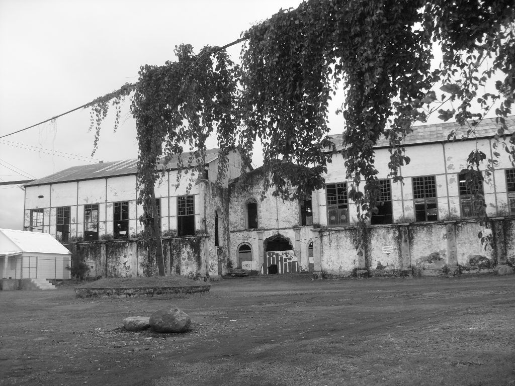 Ancienne usine de Pierrefonds.